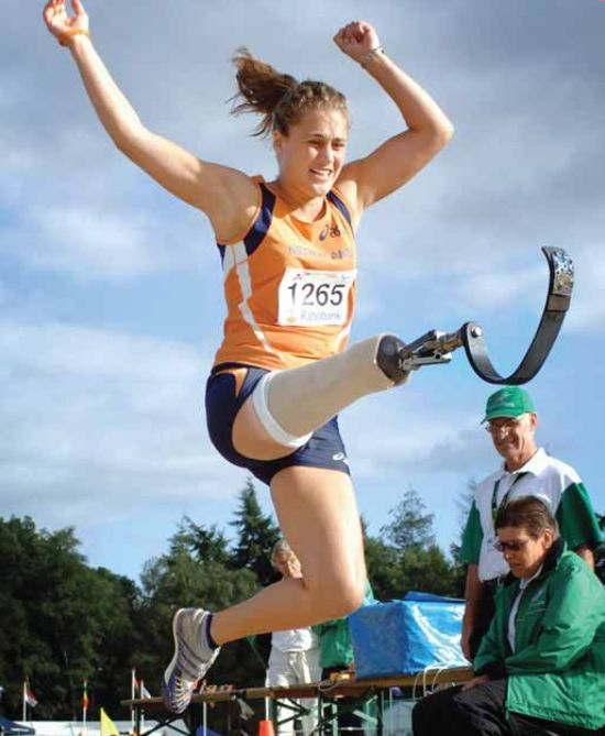 Annette Roozen - Verspringen WK 2006 te Assen